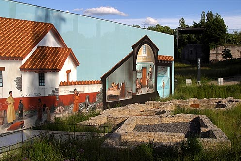 Augst: Bad (Augusta Raurica)